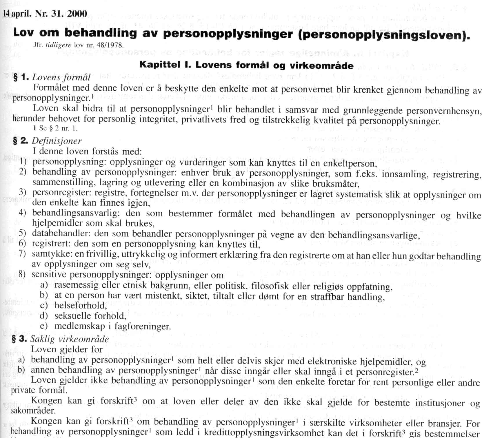 Scannet fra "Norges lover"